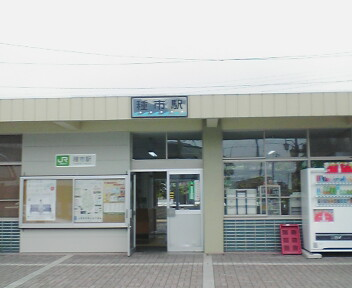 種市駅舎